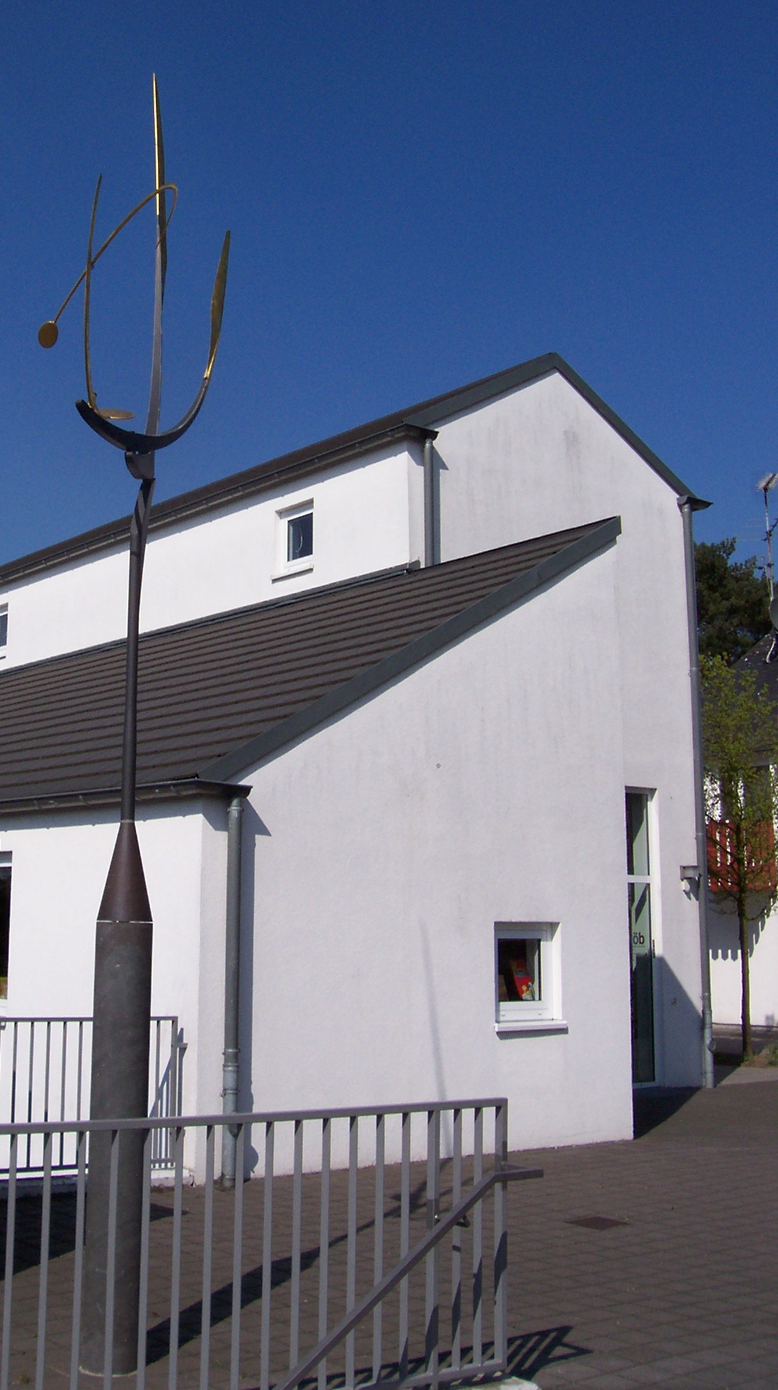 Clemenshaus St. Clemens Bergisch Gladbach